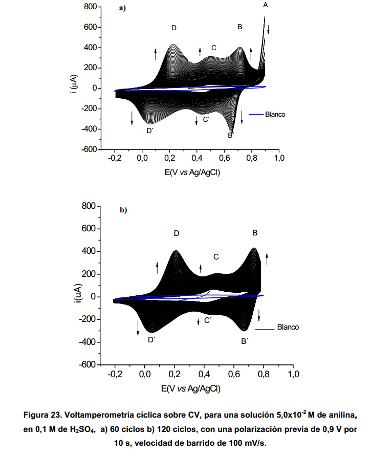 Elctropolimerización de la Anilina sobre CV